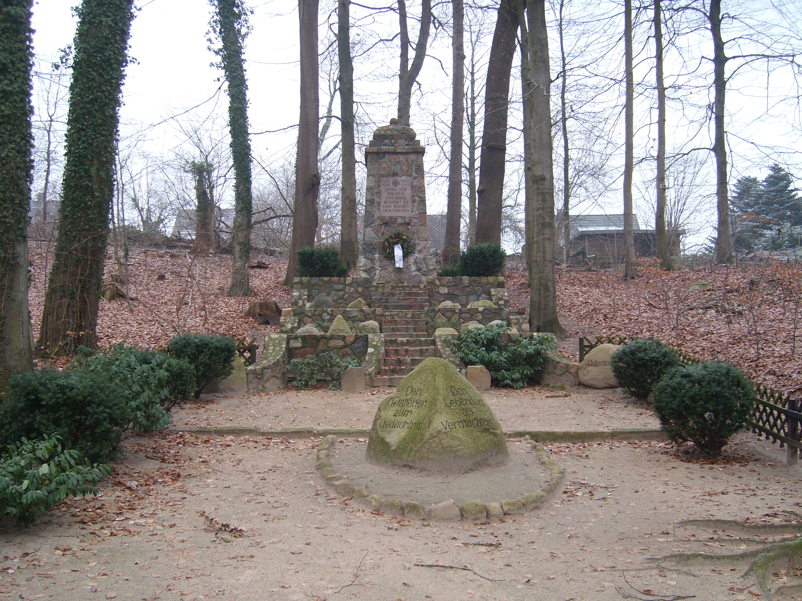 Denk- und Mahnmal Erster und Zweiter Weltkrieg an der Chaussee, Oelixdorf